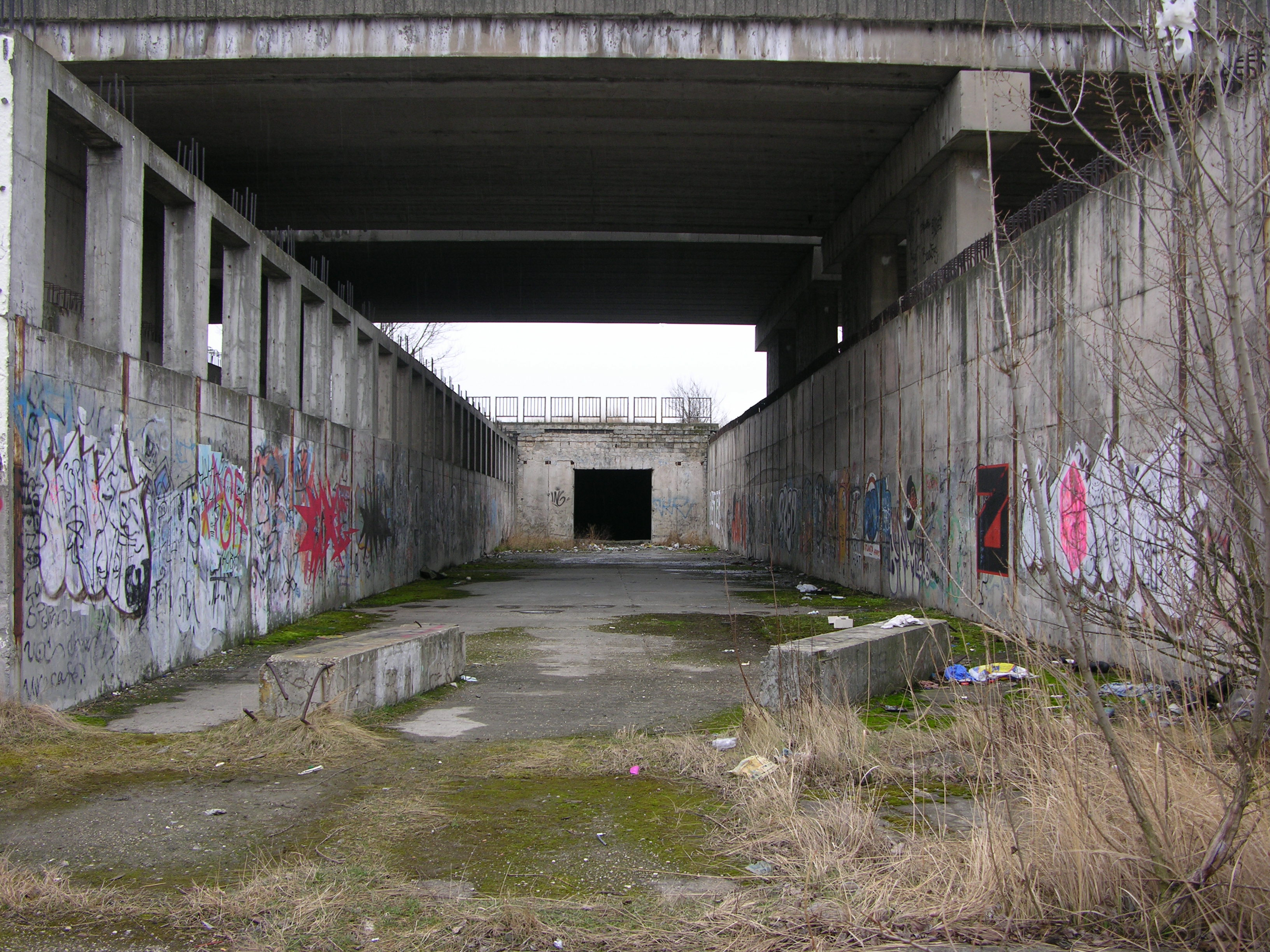 Pohled do stanice a depa bratislavského metra